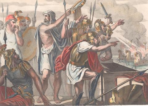 Archimedes setzt bei der Belagerung von Syrakus mit einem Brennspiegel die feindlichen Schiffe in Brand